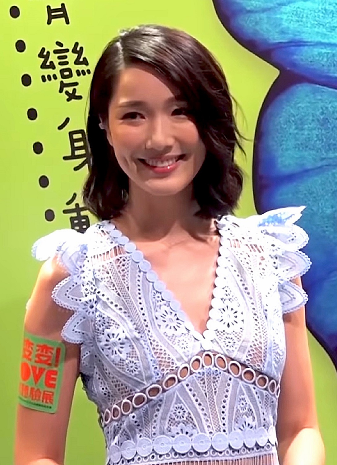 中文（香港）: 2004年溫哥華華裔小姐及2005年國際華裔小姐競選冠軍